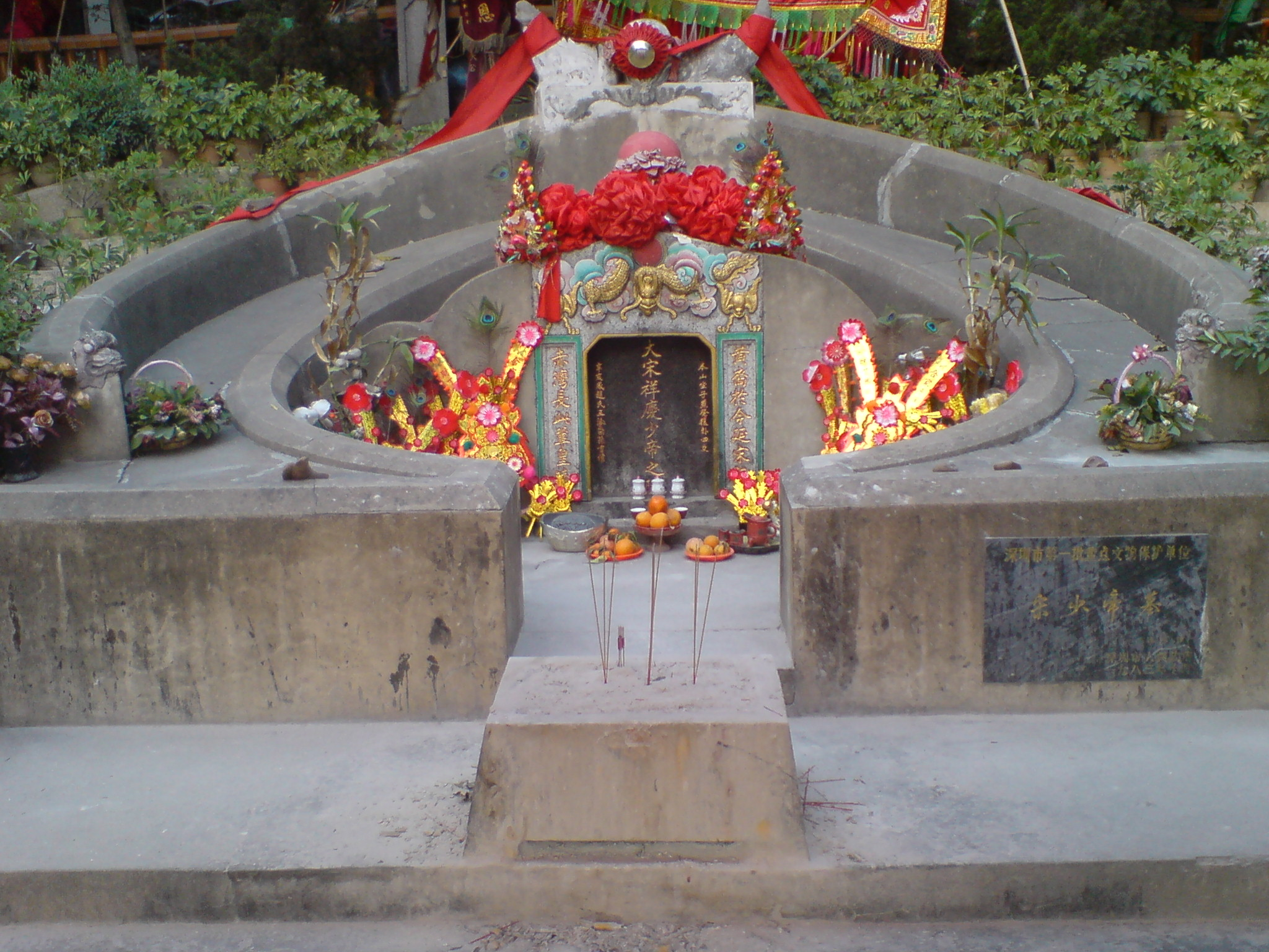 宋少帝陵